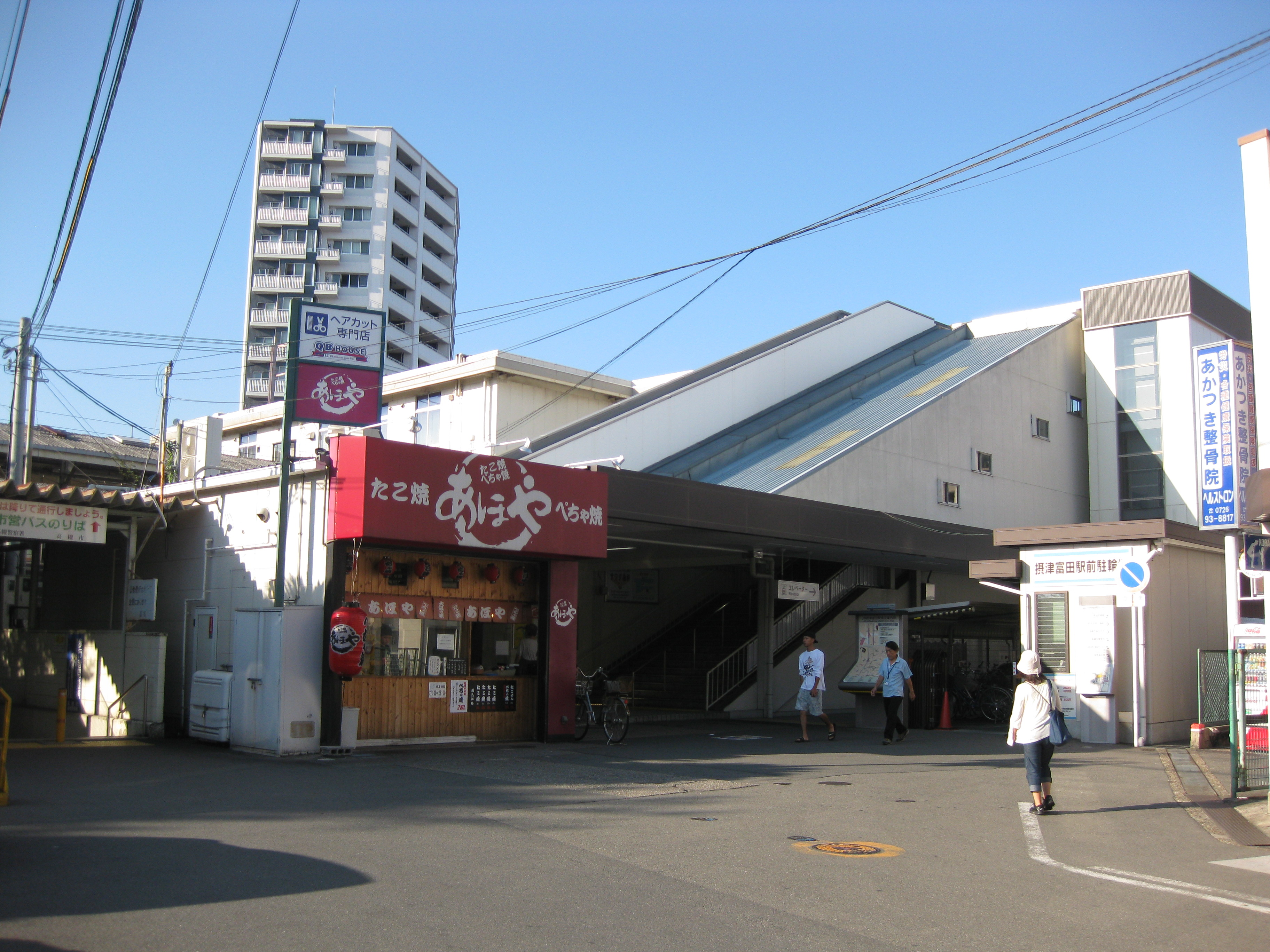 摂津富田駅南出口